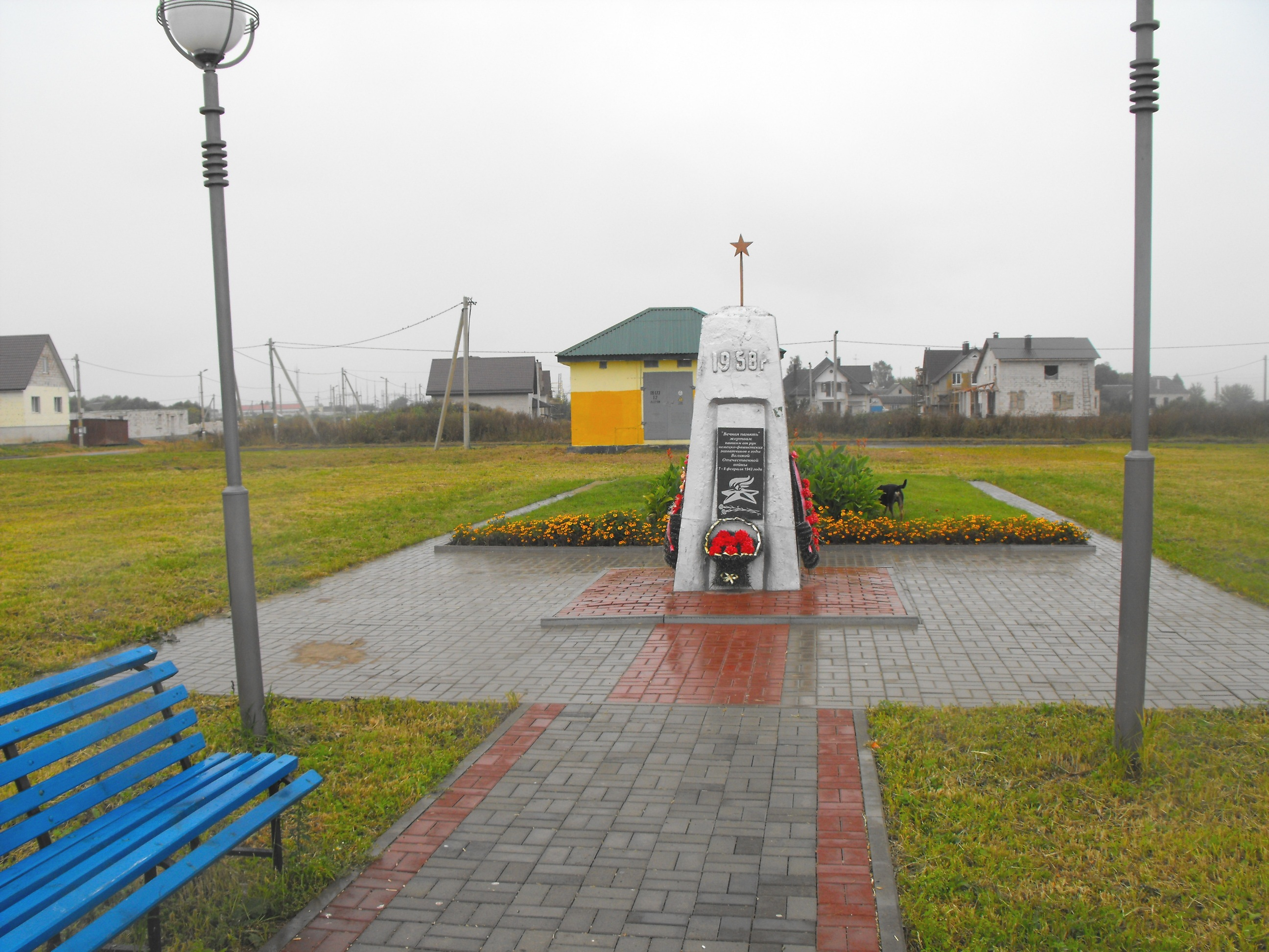 Памятник убитым евреям, узникам Слуцкого гетто, 7-8 февраля 1943 года. Расположен в Слуцке на улице Монахова.